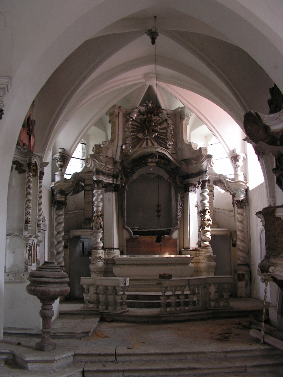 Kostel sv. Martina (Kozly), Kozly